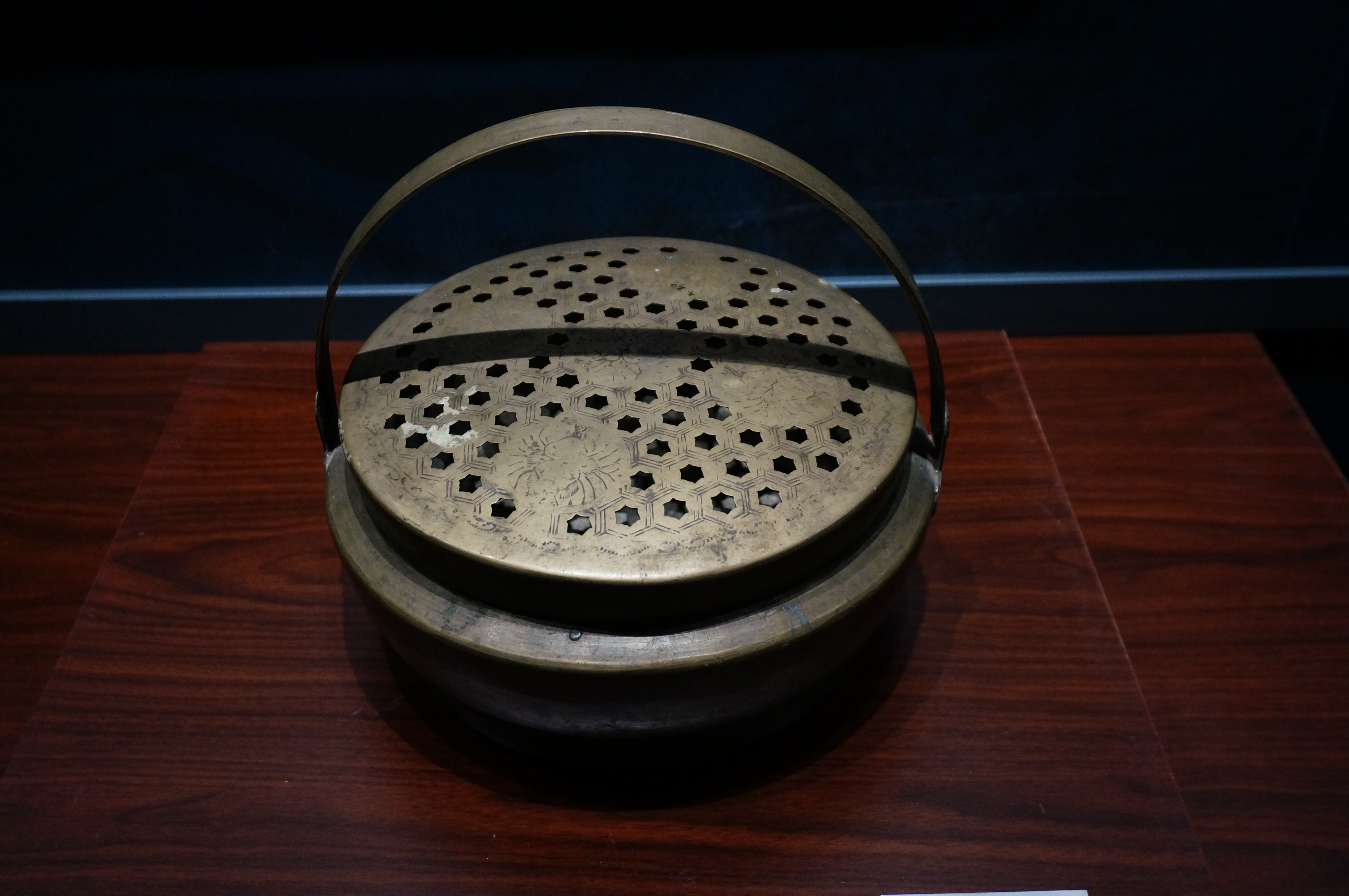 民国铜脚炉，武义博物馆藏。